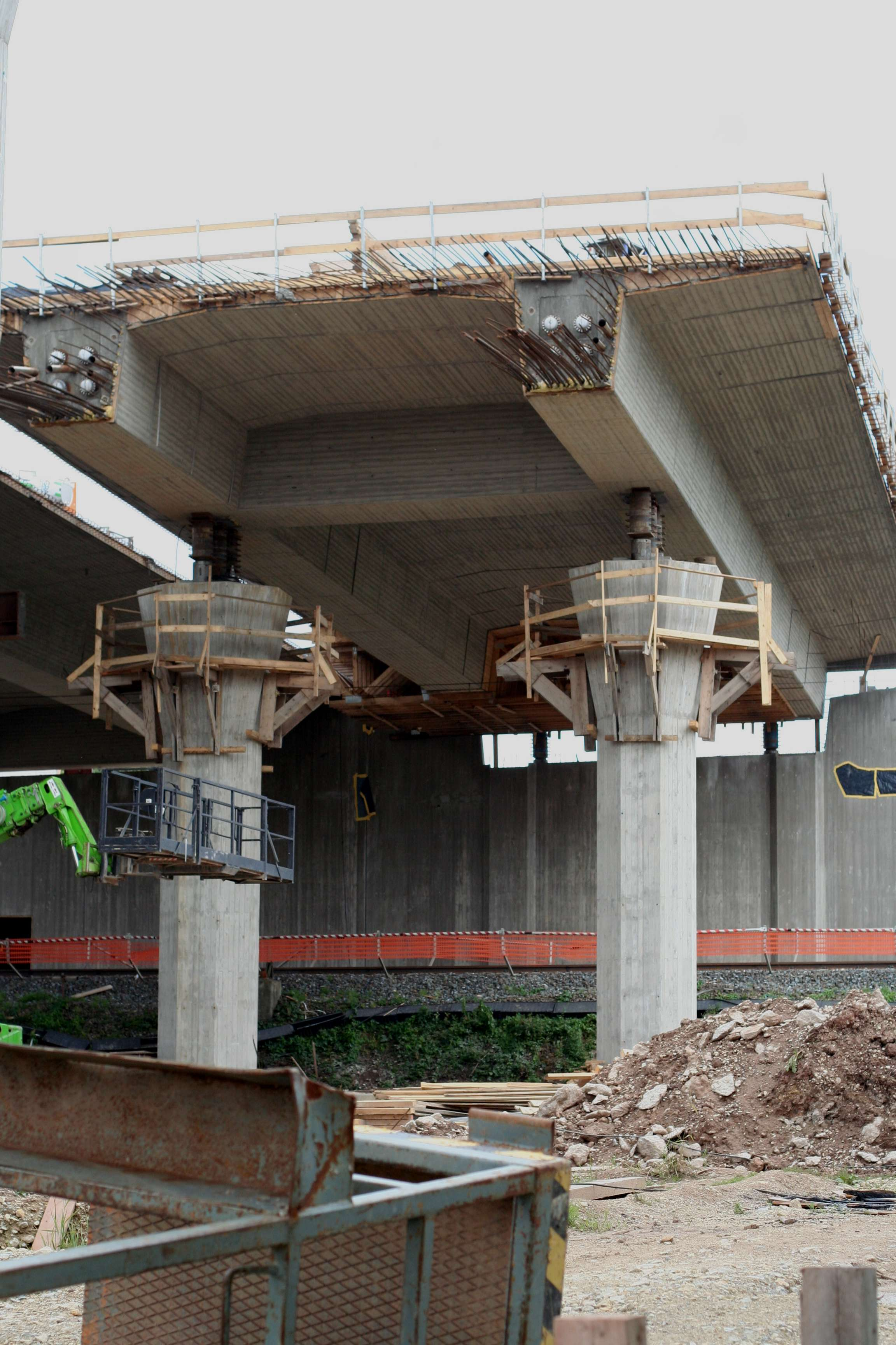 Füllbachtalbrücke, bei Zeickhorn (Grub am Forst) in Oberfranken Aufgebockter 1. Bauabschnitt